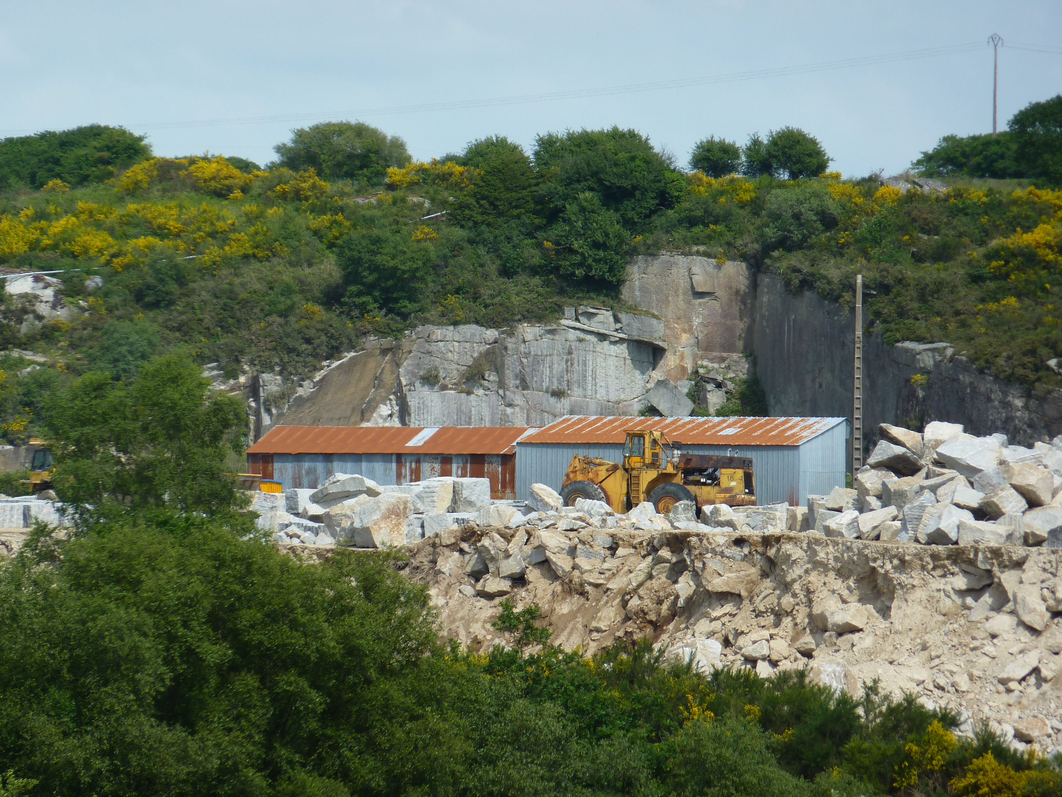 Brennilis: la carrière de Roc'h Pérez